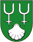 znak obce